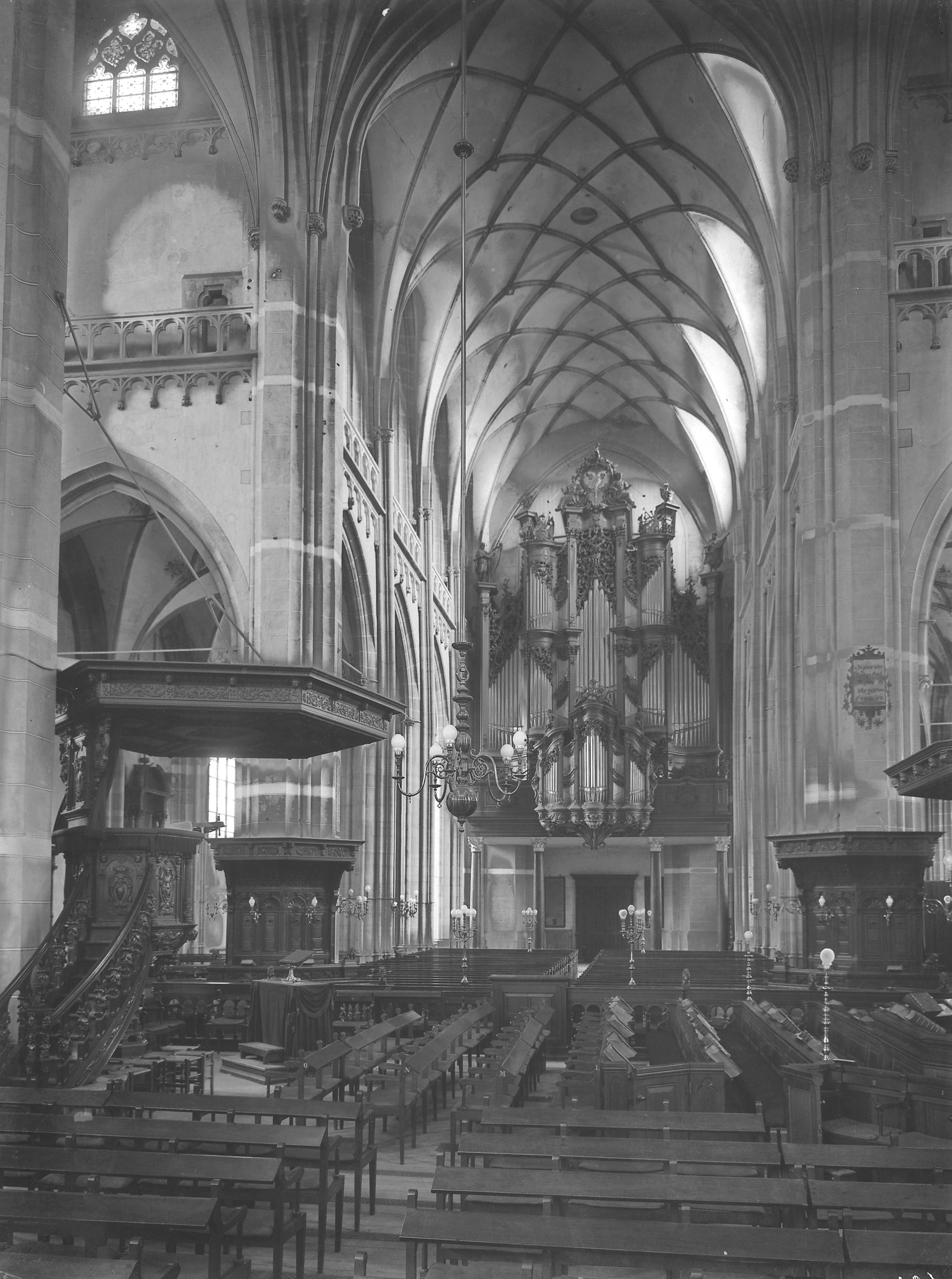 Eusebius- of Grote Kerk (Nederlands Hervormd): Interieur, overzicht naar het orgel met preekstoel (opmerking: In: Buiten ; 20(1926); nr. 35, p. 409)